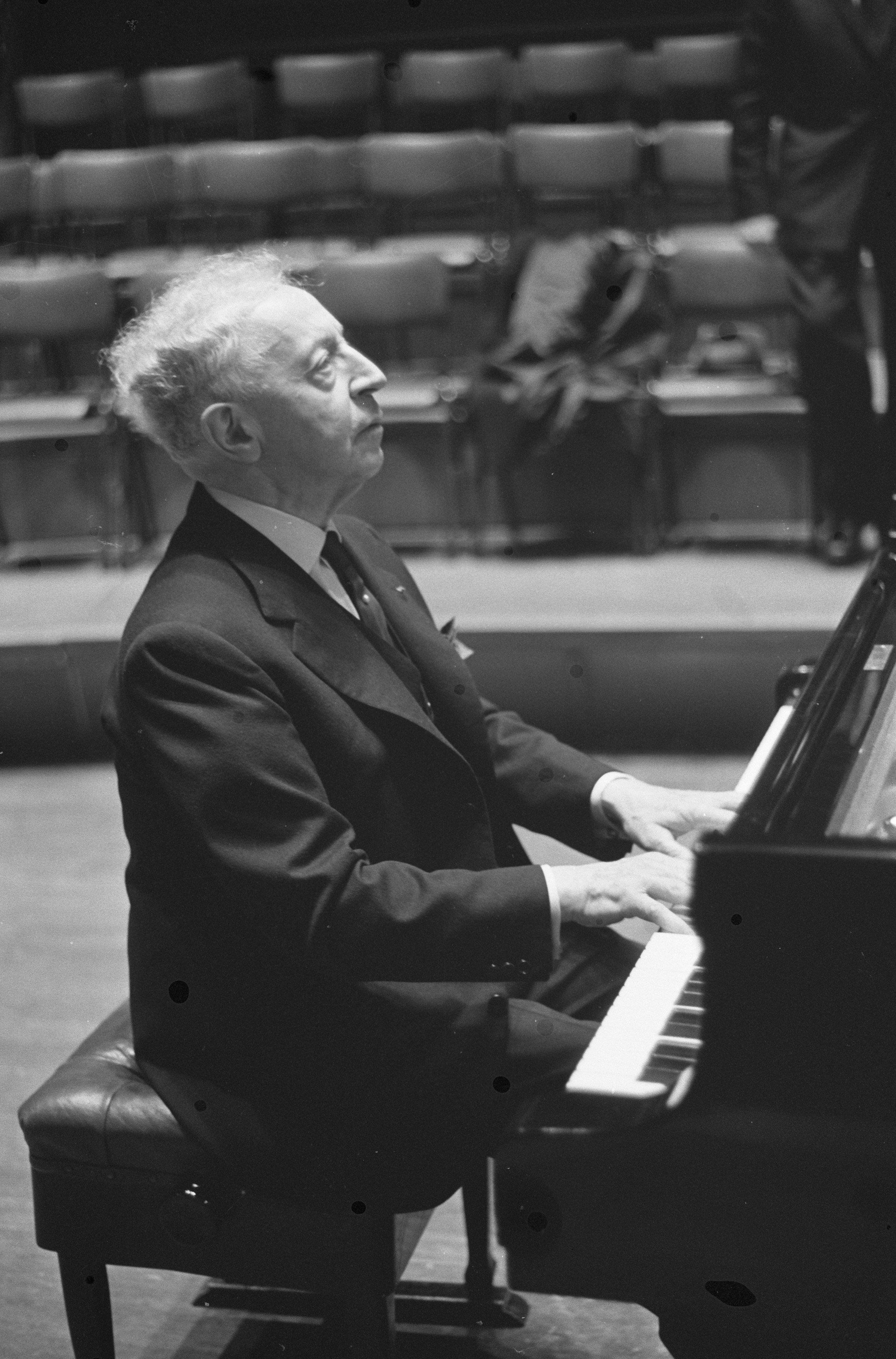 Collectie / Archief : Fotocollectie Anefo Reportage / Serie : [ onbekend ] Beschrijving : Optreden Arthur Rubinstein in Concertgebouw Datum : 13 februari 1962 Locatie : Amsterdam, Noord-Holland Trefwoorden : musici, pianisten, portretten Persoonsnaam : Rubinstein, Arthur Fotograaf : Rossem, Wim van / Anefo Auteursrechthebbende : Nationaal Archief Materiaalsoort : Negatief (zwart/wit) Nummer archiefinventaris : bekijk toegang 2.24.01.05 Bestanddeelnummer : 913-5228